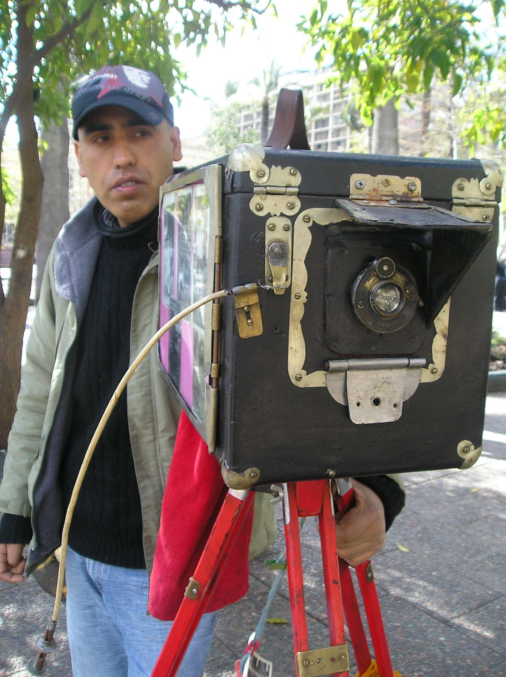 Fótografo minutero Luis Maldonado en la Plaza de Armas de Santiago de Chile, agosto de 2007.